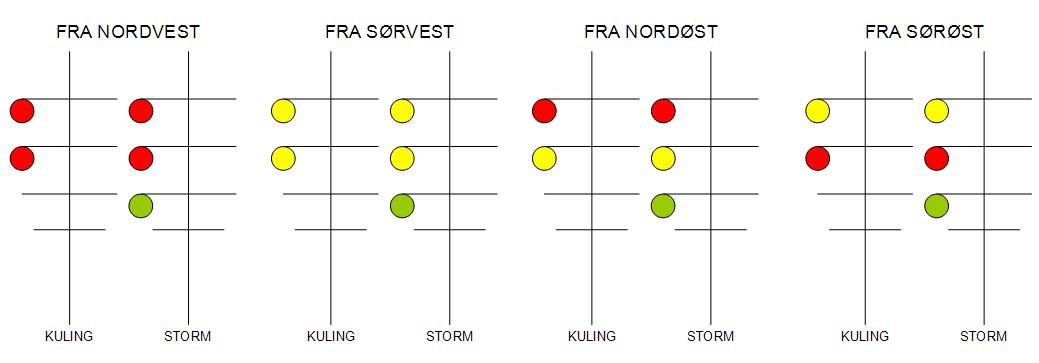 Forklaring på lyskombinasjonene til Stormvarselet i Kristiansund